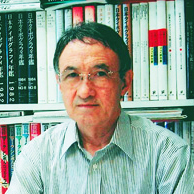 篠原榮太 仕事場にて